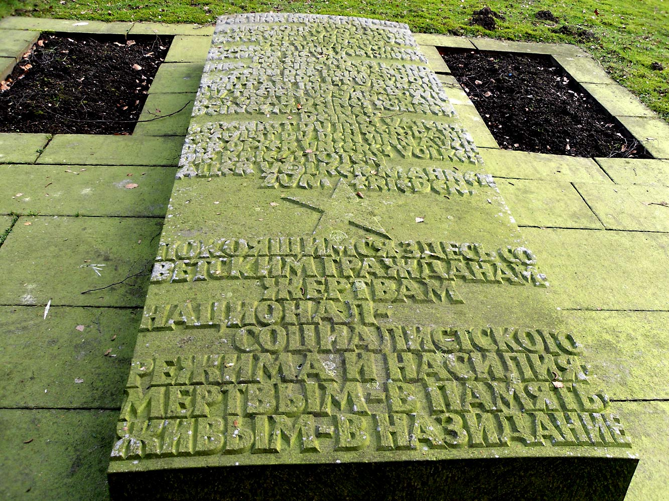 Bochum-Altenbochum, Hauptfriedhof Freigrafendamm. Das russische Grundstück bei Feldmark Str.